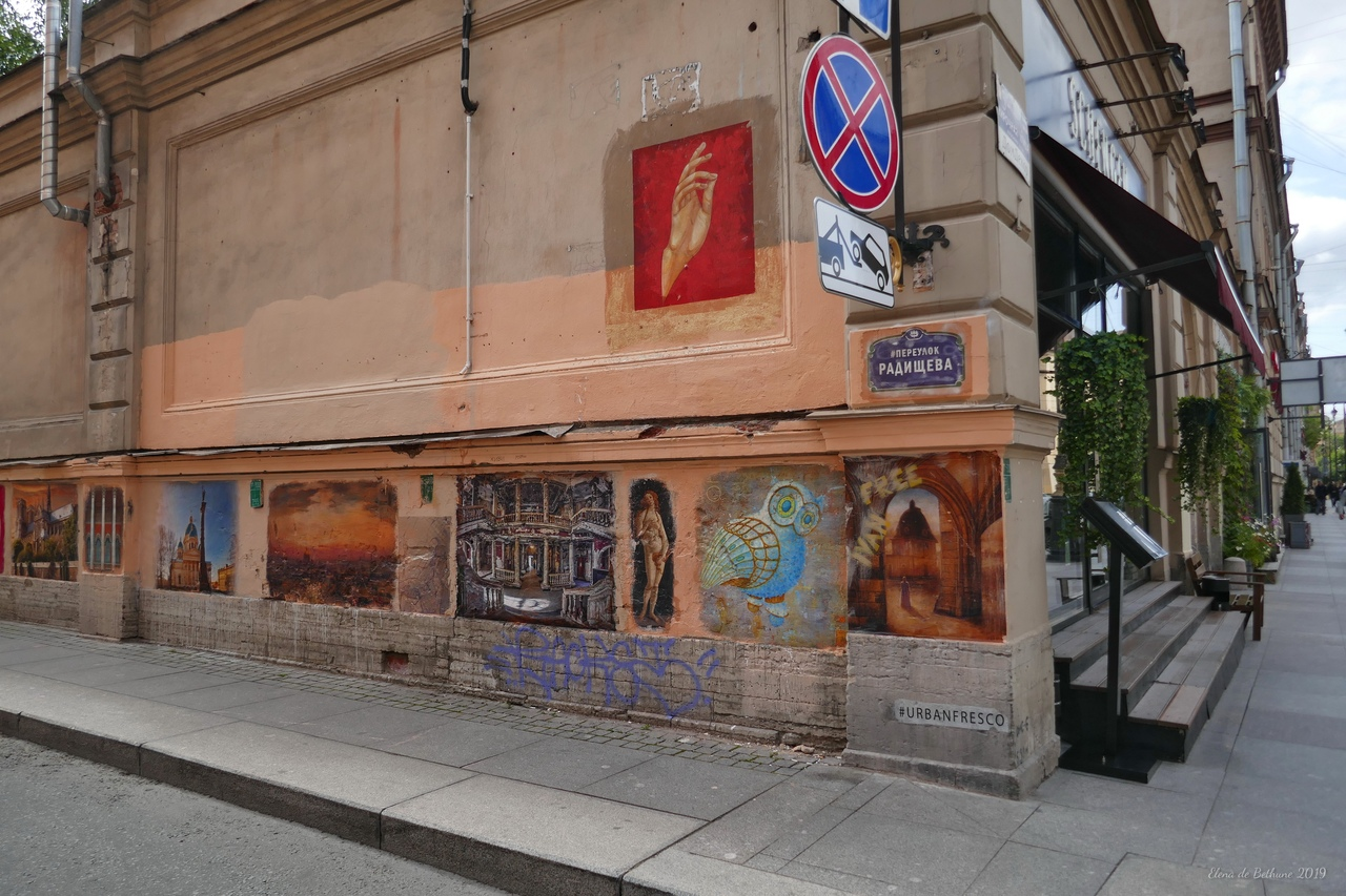 Галерея Урбанфреска